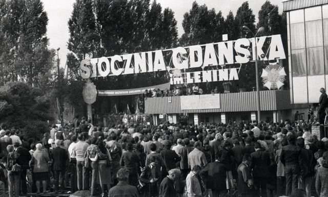 Mieszkańcy Gdańska zgromadzeni przed historyczną Bramą nr 2 Stoczni Gdańskiej im. Lenina w oczekiwaniu na ogłoszenie podpisania Porozumień Gdańskich